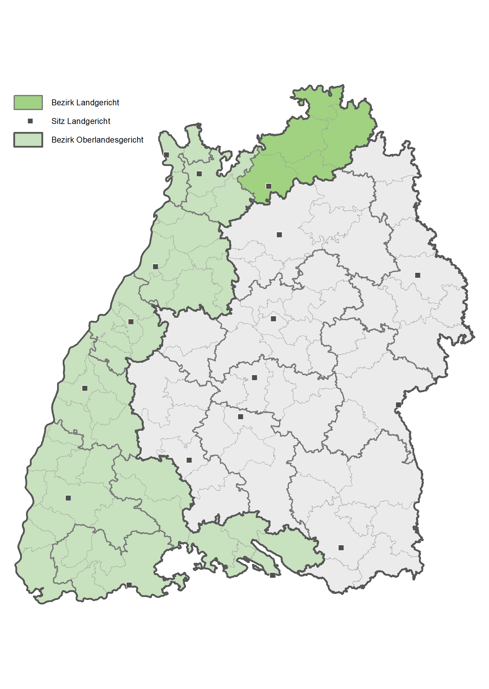 Karte des Bezirks des Landgerichts Mosbach in Baden-Württemberg